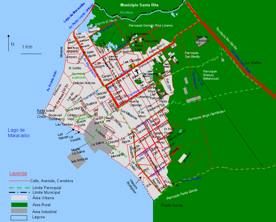 Mapa de la ciudad de Cabimas, municipio Cabimas, Estado Zulia, Venezuela, donde se muestra además la isla artificial de La Salina